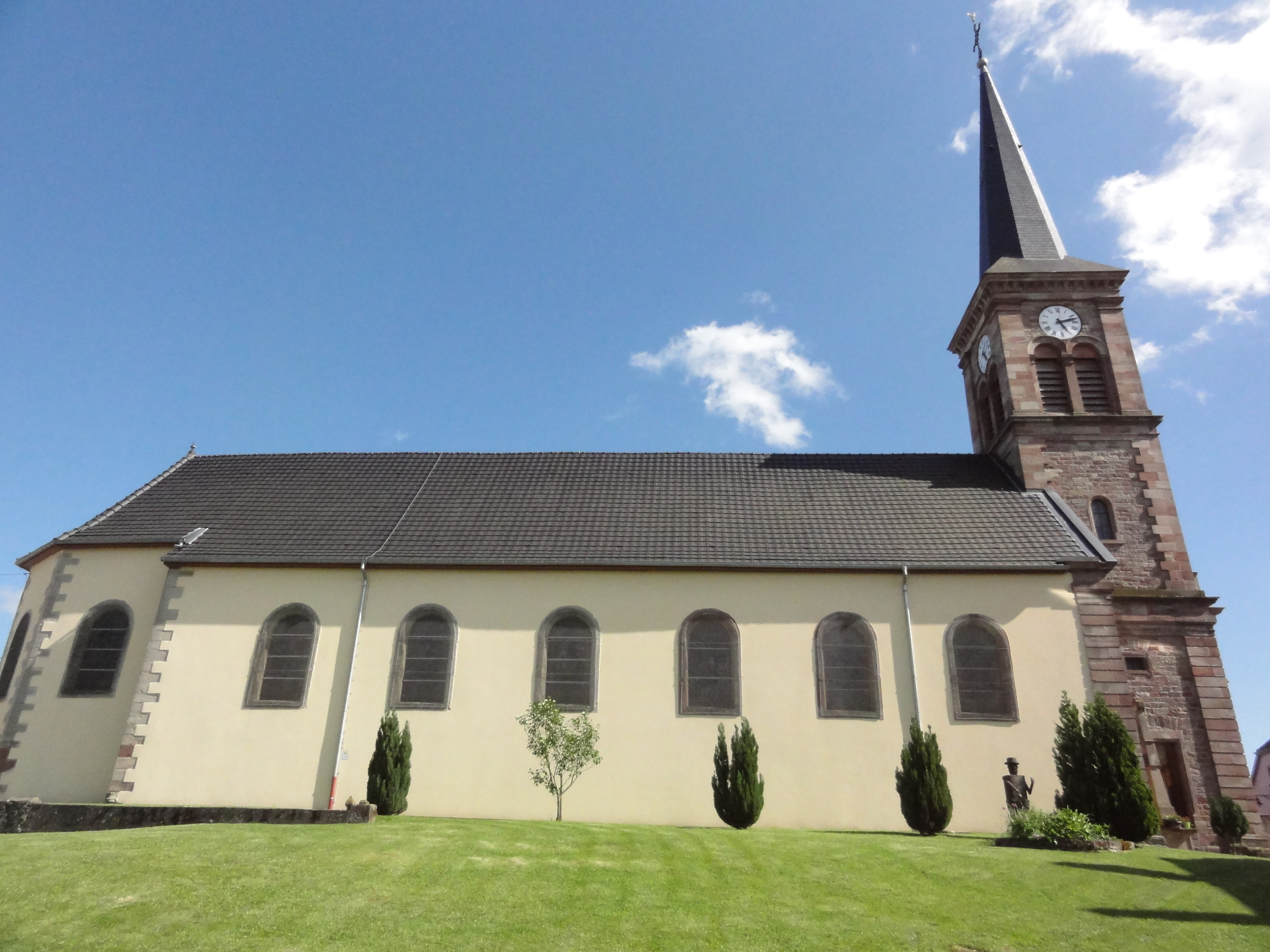 Hommarting (Moselle) Église Saint-Martin